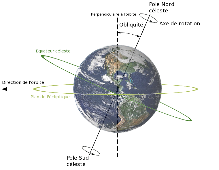 Description de l'inclinaison de l'axe de la Terre (obliquité) et son rapport aux plans de l'écliptique, à l'équateur céleste et à l'axe de rotation. La Terre est présentée telle que vue depuis le Soleil et la direction de son orbite est dans le sens inverse des aiguilles d'une montre (elle part donc vers la gauche).